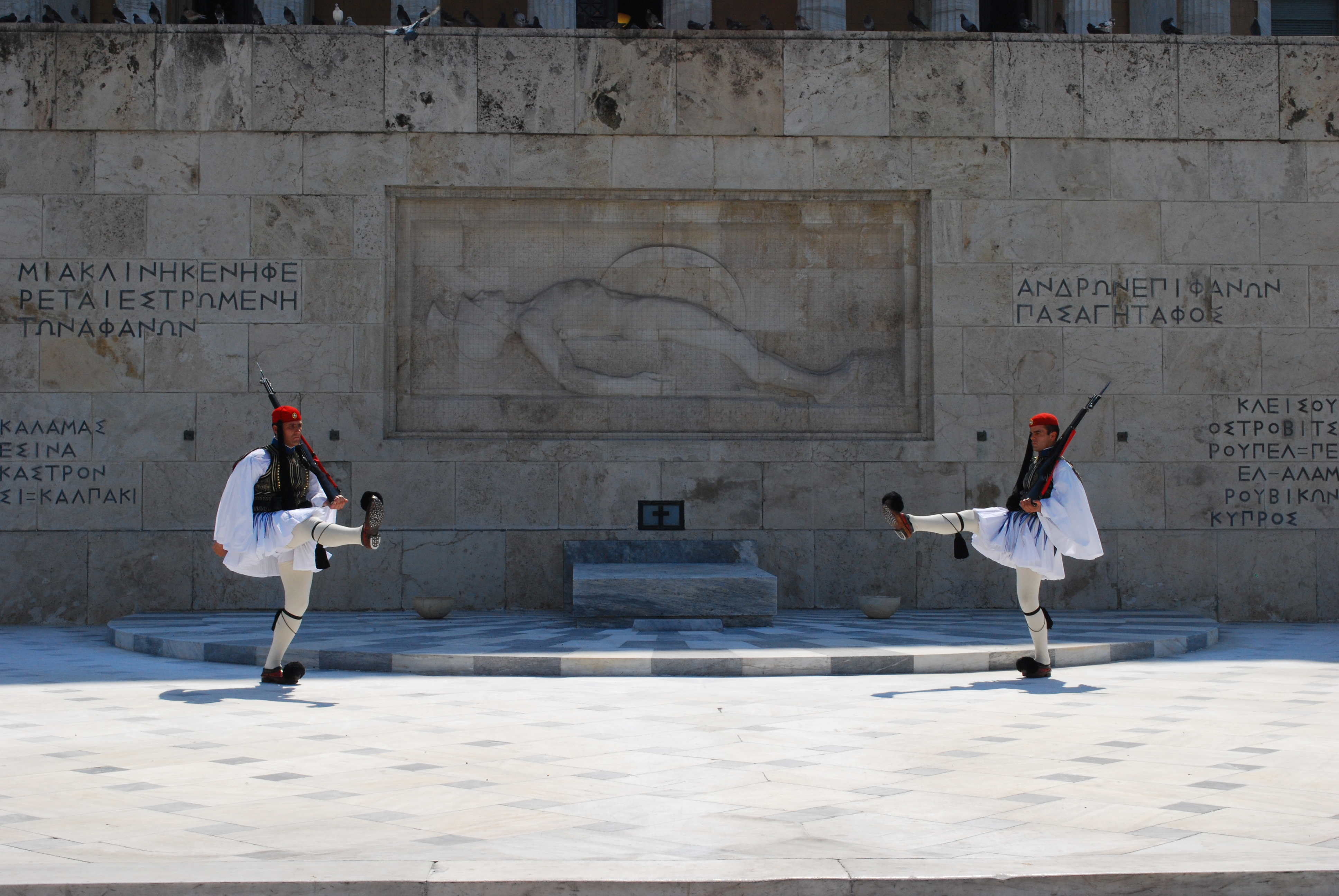 La relève de la garde au parlement grec, le dimanche 2 août 2009, à Athènes.